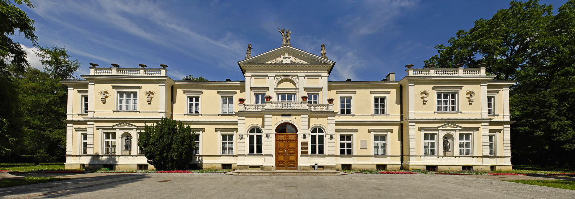 Pałac Krasińskich na Ursynowie. Obecnie mieści się w nim rektorat SGGW.